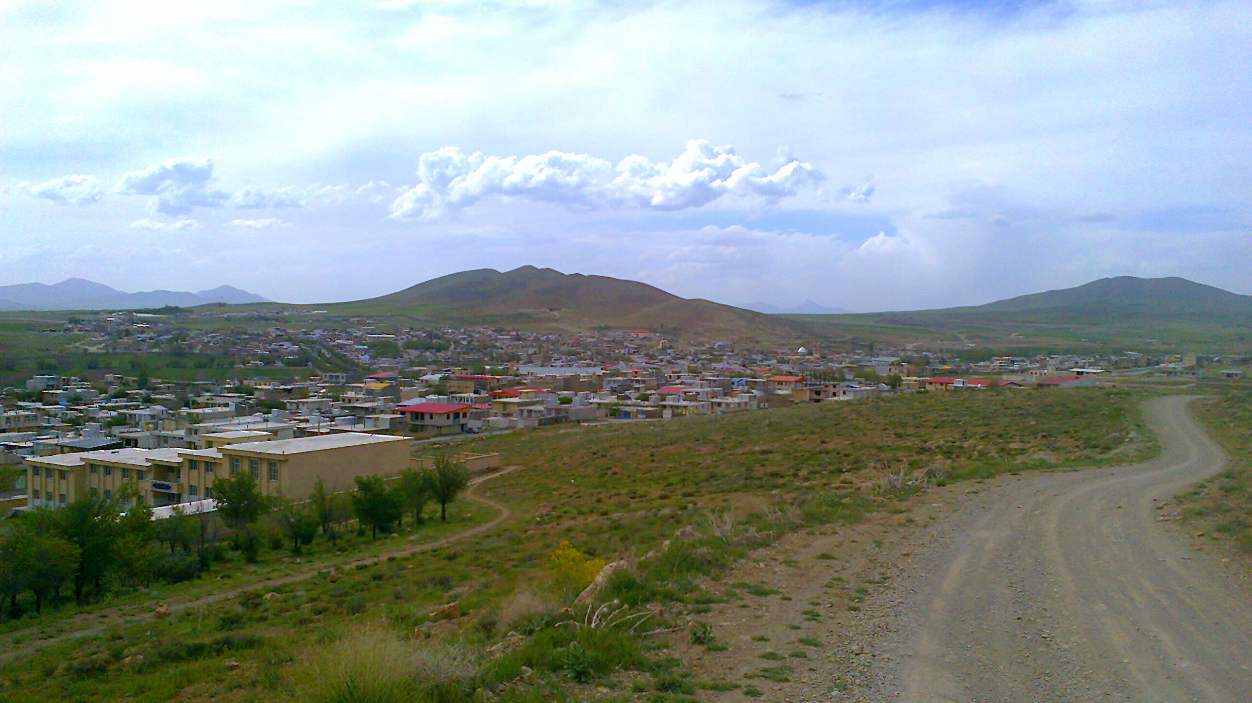 نمایی از بویین و میاندشت